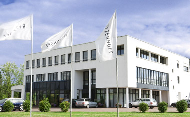 Verwaltungsgebäude RITZENHOFF AG